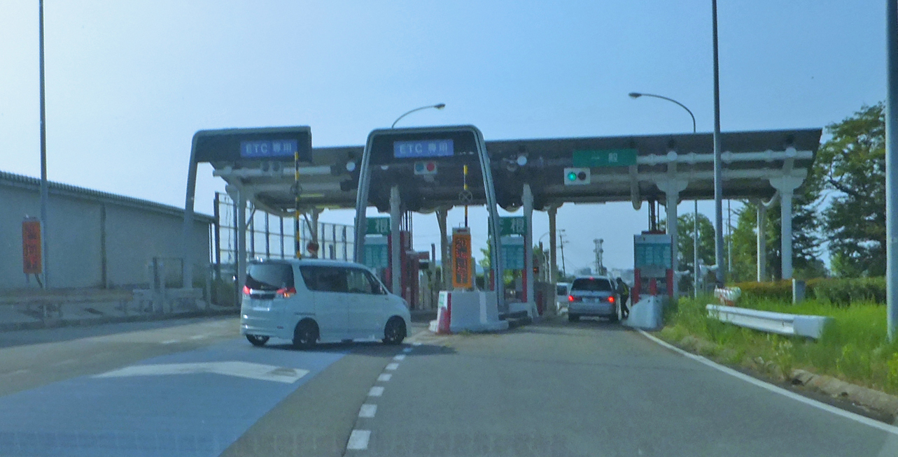 彦根インターチェンジ